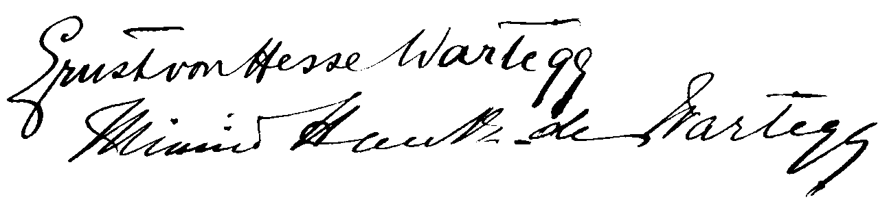 Unterschriften des Reiseschriftstellers Ernst von Hesse-Wartegg und seiner Frau Minnie Hauck-Wartegg